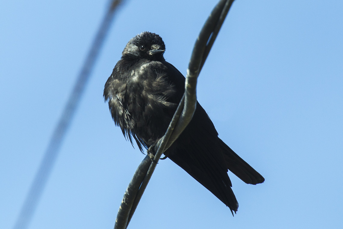 Daurian Jackdaw Coloeus dauuricus, juvenile, Kyushu, Japan